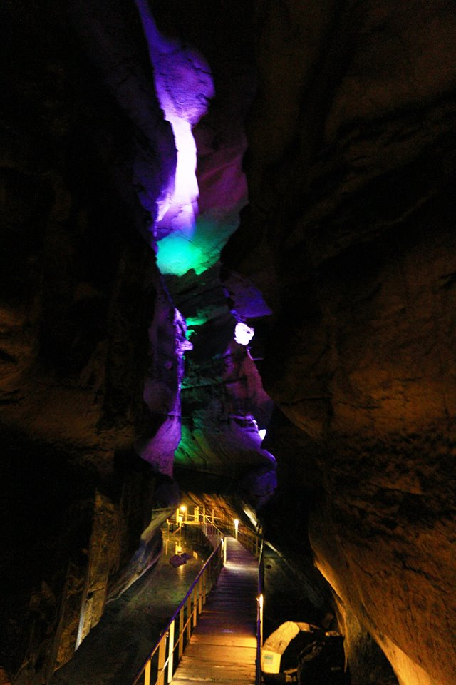 mağara içi